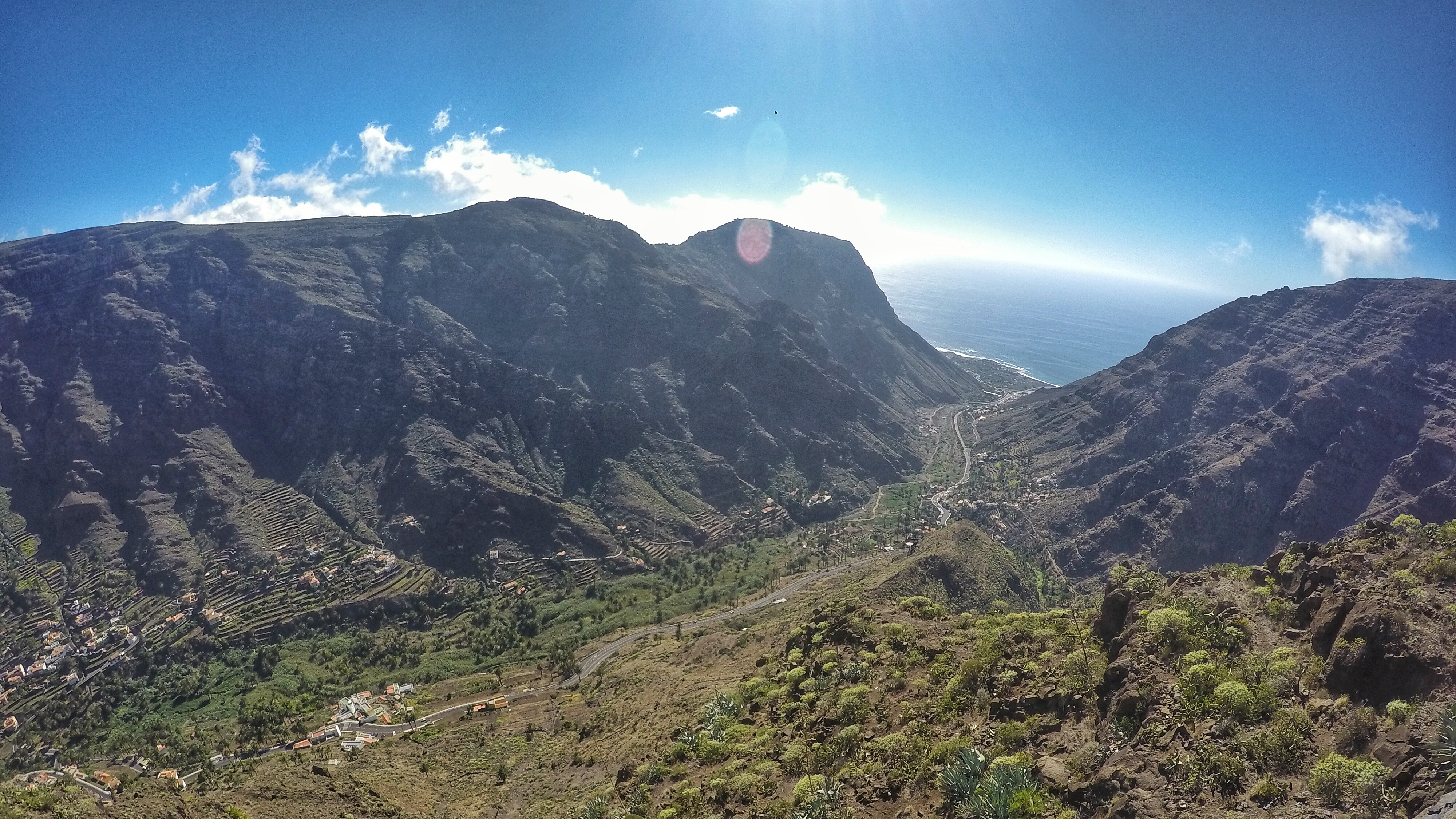 Valle Gran Rey (enero 2016)